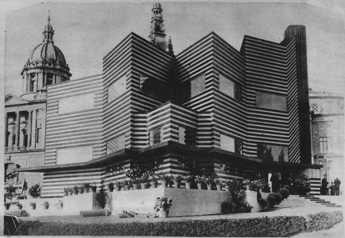 Pavelló dels Regnes Serbi, Croata i Eslovè: representació del país que posteriorment es denominaria Iugoslàvia, fou obra de l'arquitecte Dragiša Brašovan fet el 1929 per a l'Exposició Universal de Barcelona-1929 (Catalunya).